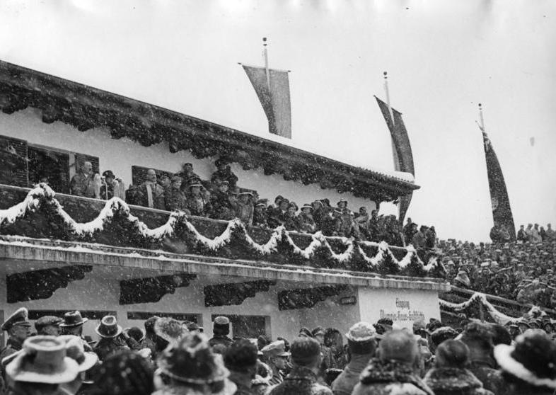 Die 4. Olympischen Winterspiele feierlich eröffnet. Der Führer und Reichskanzler erklärt die 4. Olympischen Winterspiele für eröffnet. Neben ihm der französische Botschafter Francois Poncet.